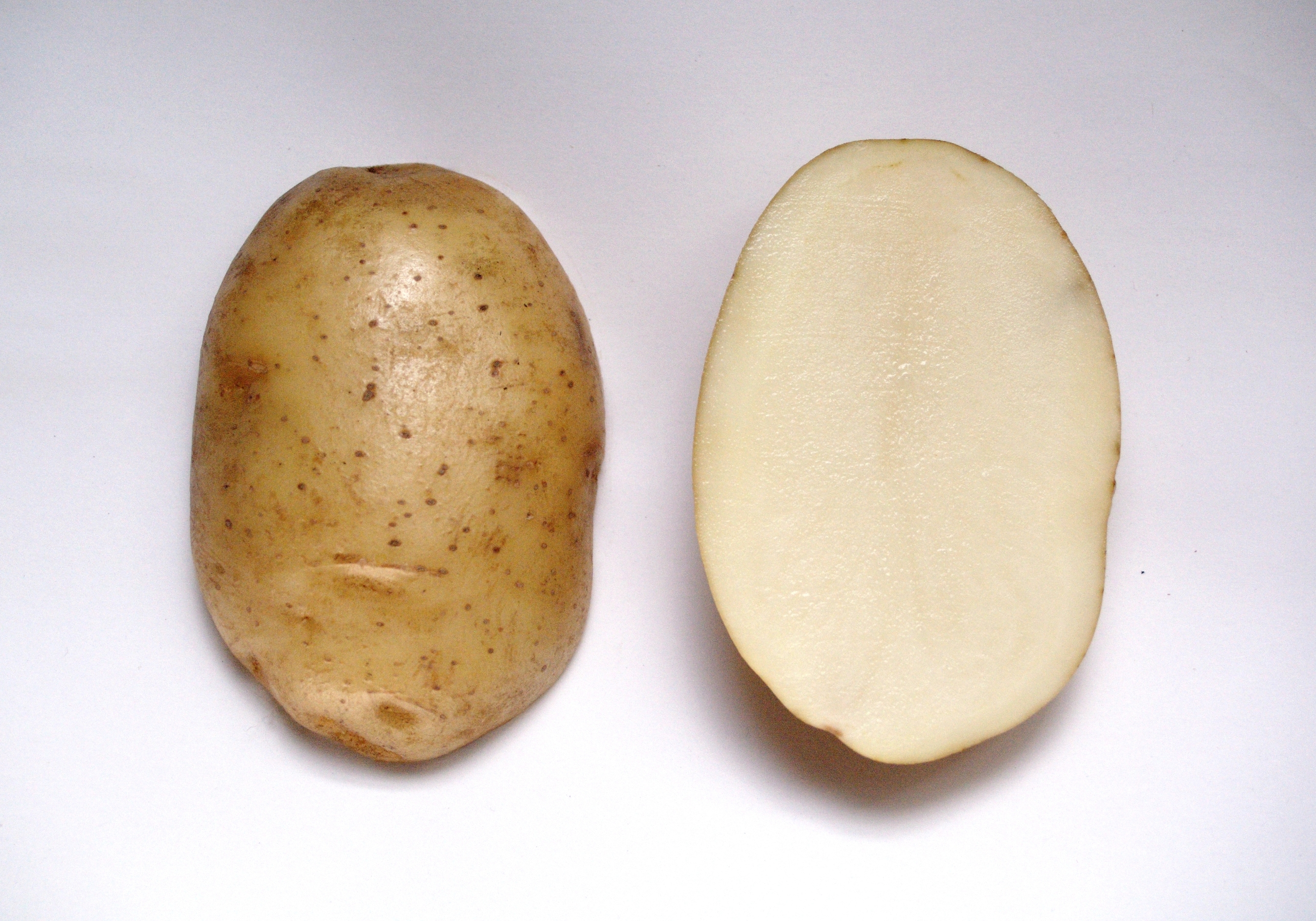 Japanese potato cultivar "Toyoshiro"